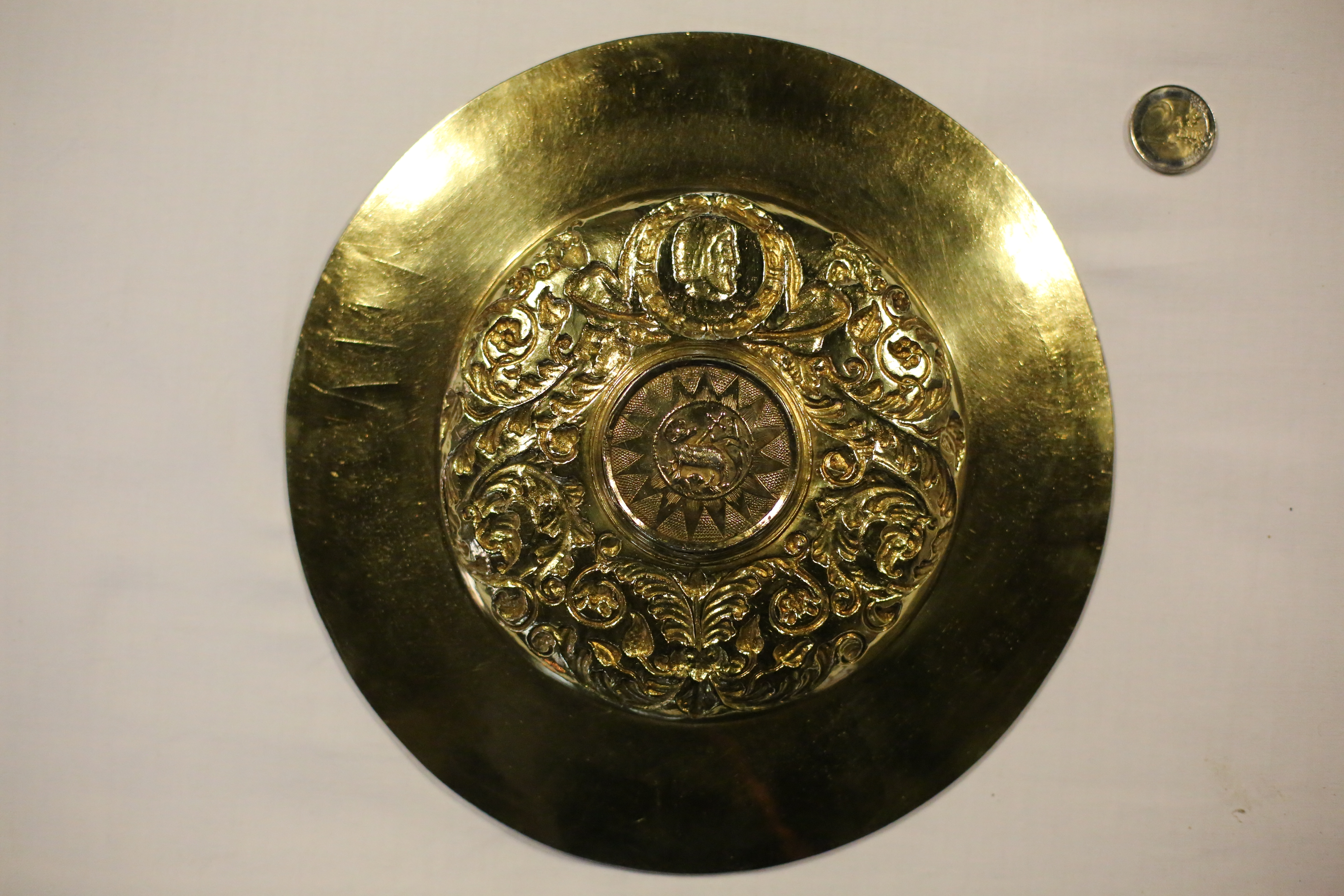 Patène du grand calice de Saint-Jean-du-Doigt, face externe, présenté à côté d'une pièce de 2 euros. Le médaillon représente l'Agnus Dei.